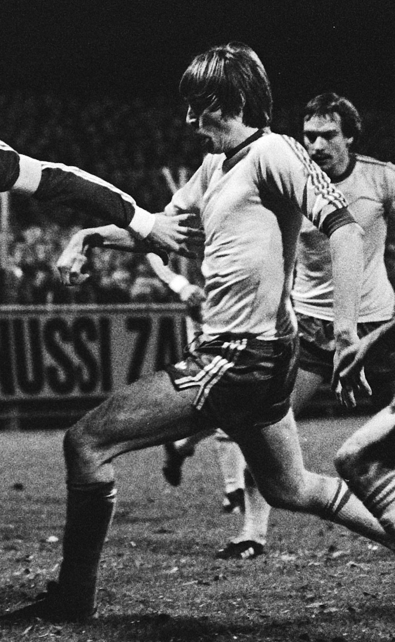 Match de football AZ'67 - Feyenoord à Alkmaar. De gauche à droite Kees Kist (AZ'67), Ivan Nielsen, Jan van Deinsen et Michel van de Korput (tous du Feyenoord). Photographie par Koen Suyk / Anefo.